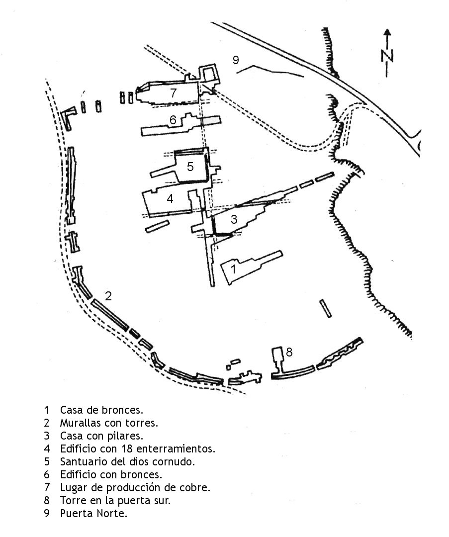 Plano de Enkomi